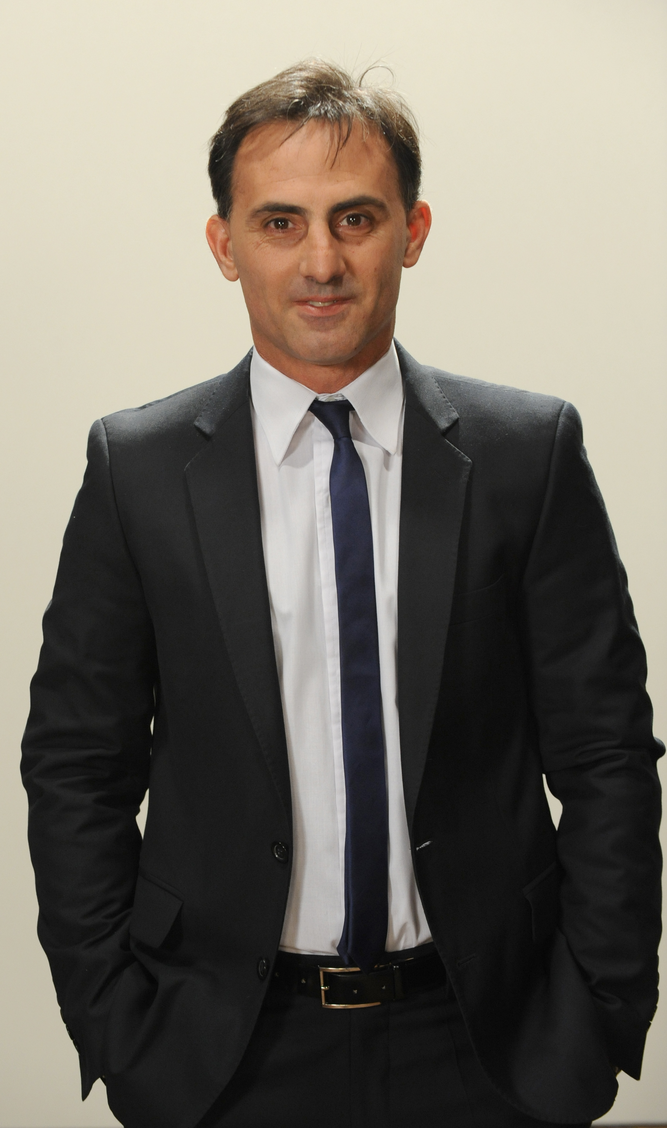 Gambetita Latorre